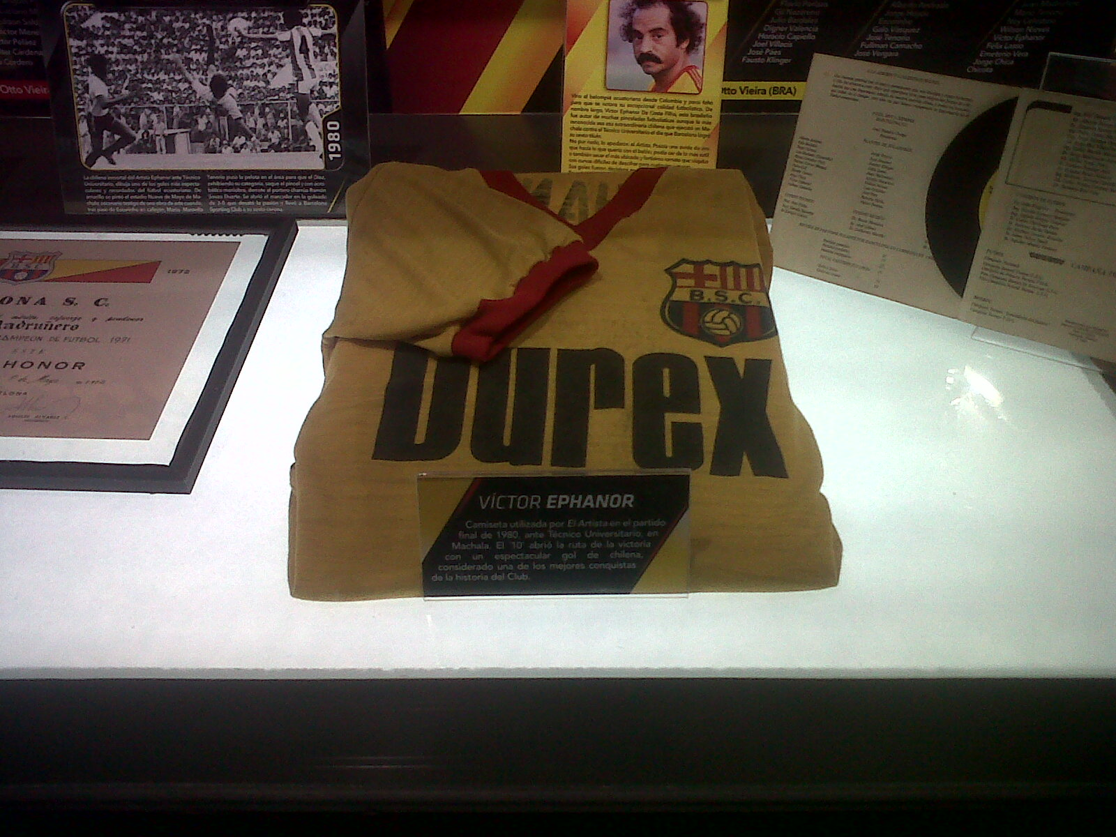 Barcelona Sporting Club - camiseta Victor Ephanor